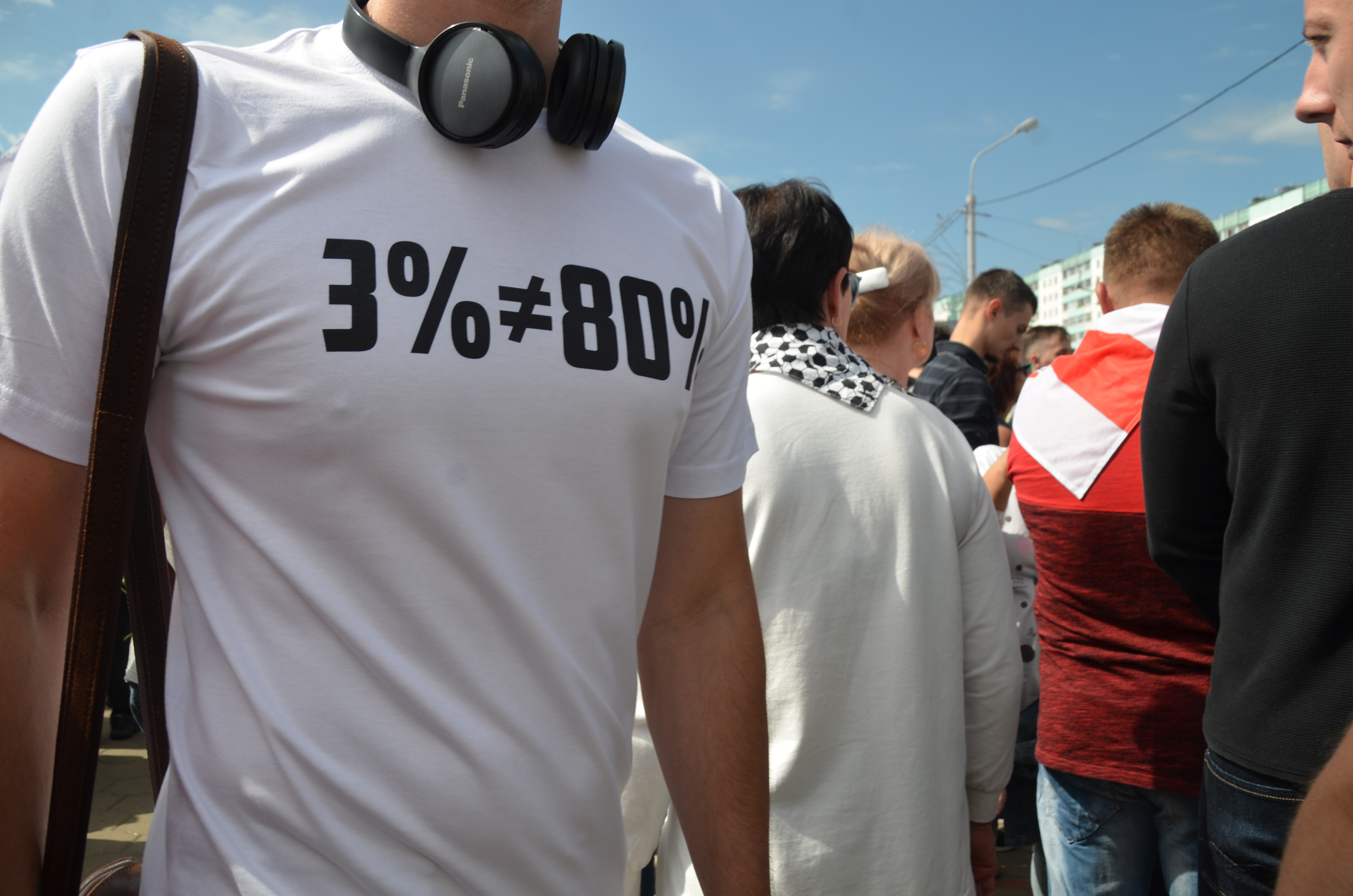 Митинг памяти Александра Тарайковского, метро Пушкинская, Минск, 15 августа 2020